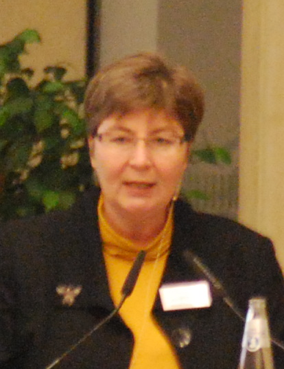 Internationale Tagung "Translatio nummorum" im November 2011 in der Berlin-Brandenburgischen Akademie der Wissenschaften.